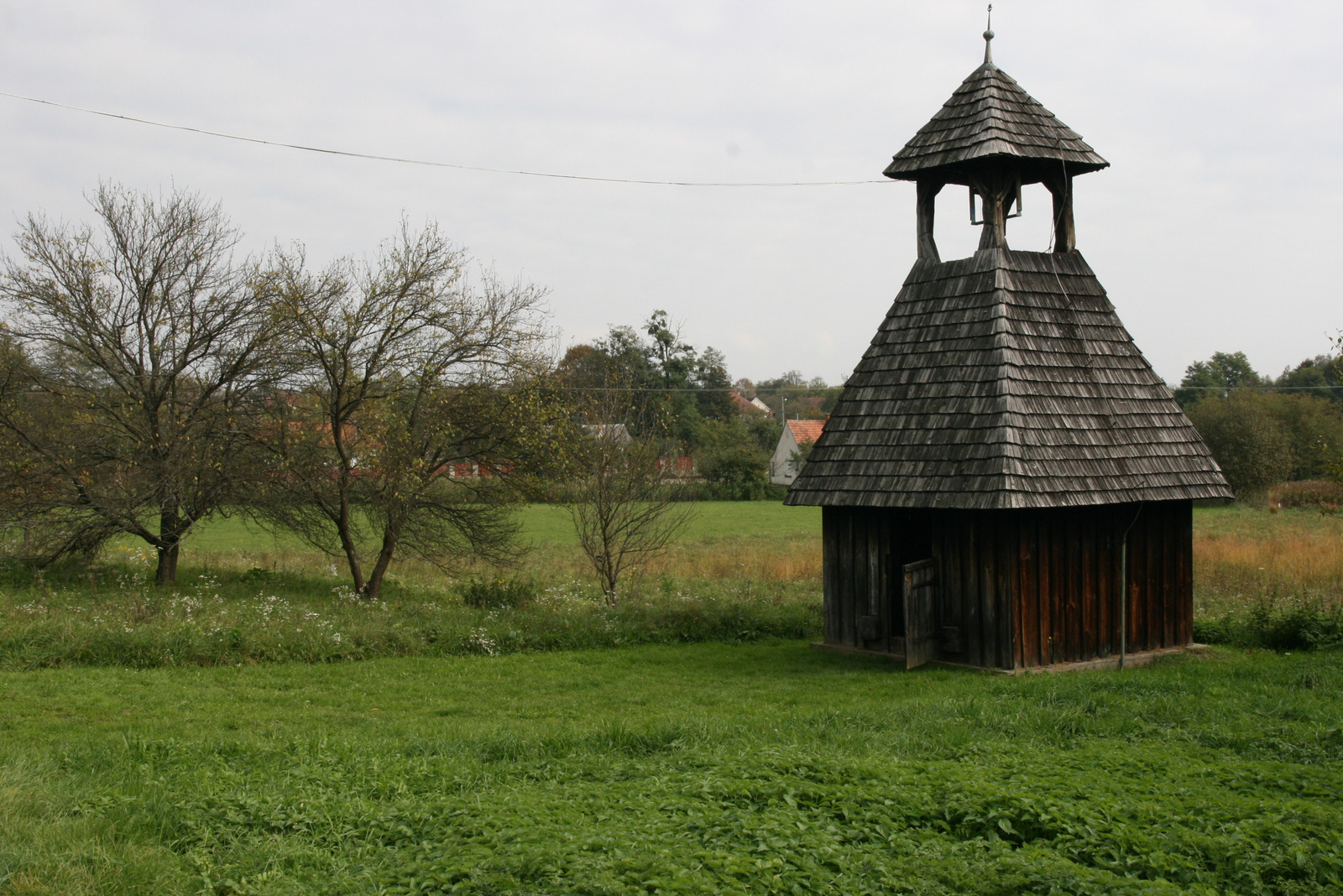 Faharangláb (Magyarszombatfa, Gödörháza, Fő út közelében) This is a photo of a monument in Hungary. Identifier: 9202